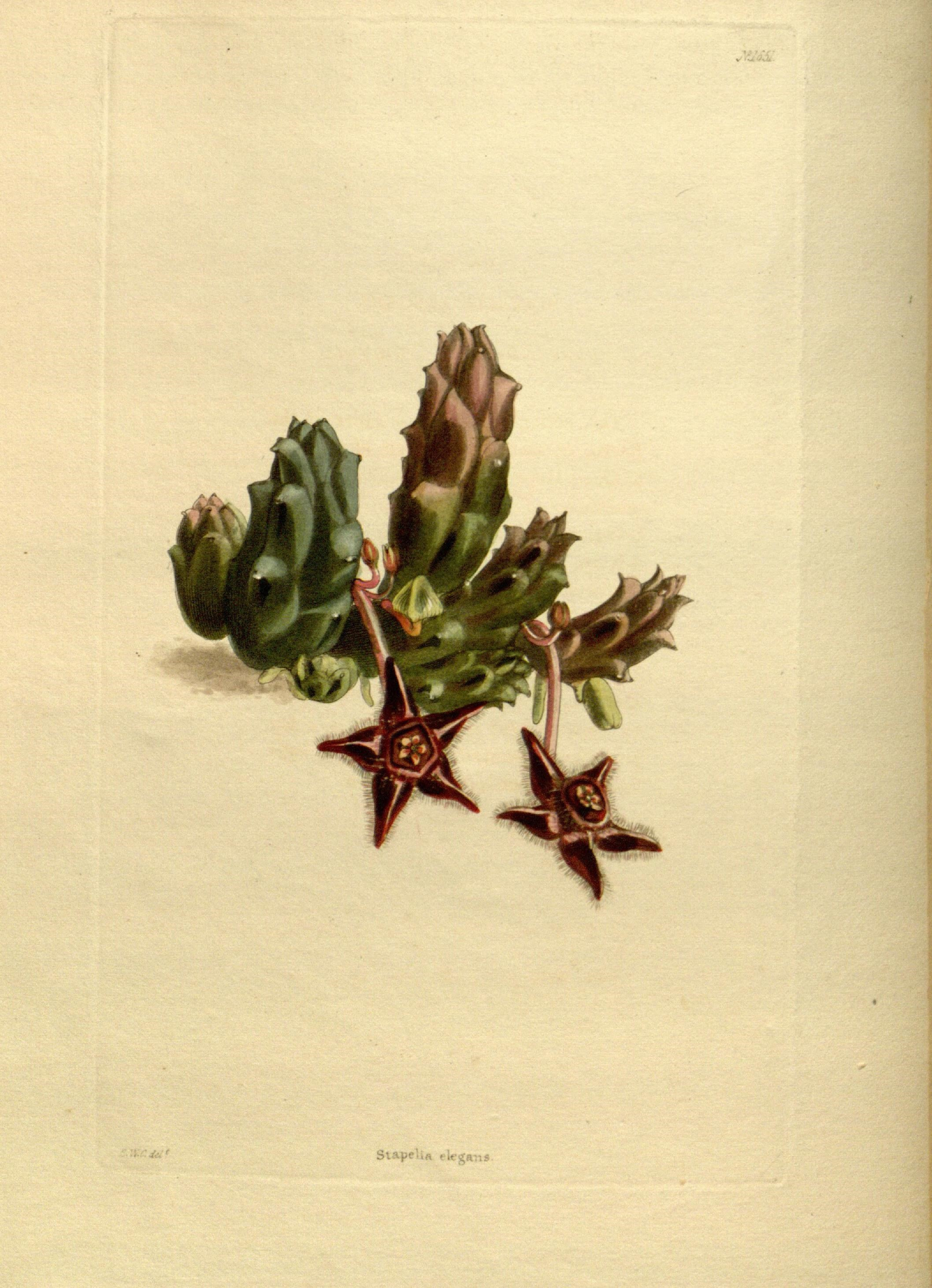 Stape'ifl . itgftn*